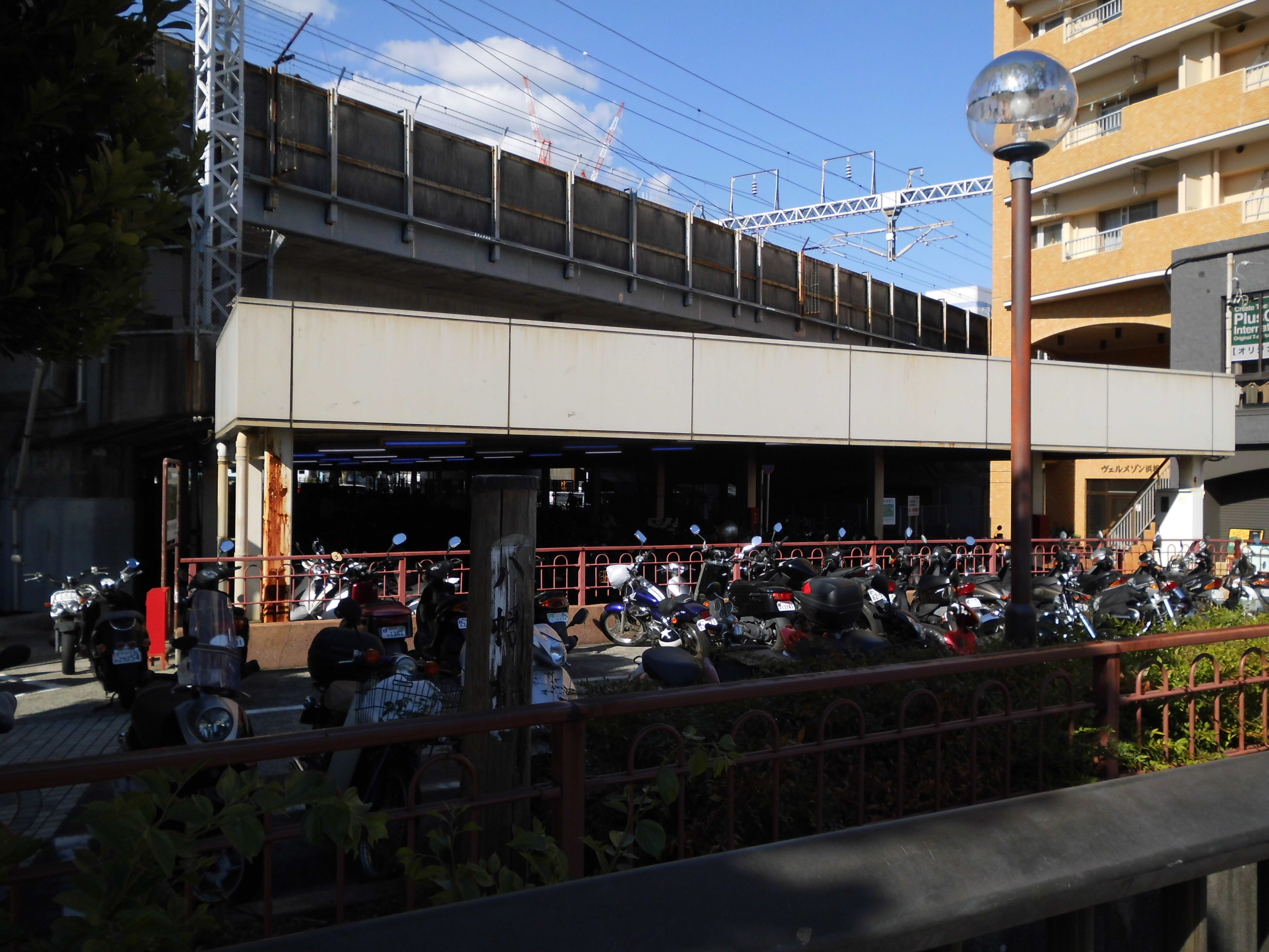 東海道新幹線高架下の八幡橋（新川橋）、日陰と逆行で見えにくいが「八幡橋」の木製橋名柱が立つ。現在河川は暗渠化され蓋をした上部は駐輪場になっている。